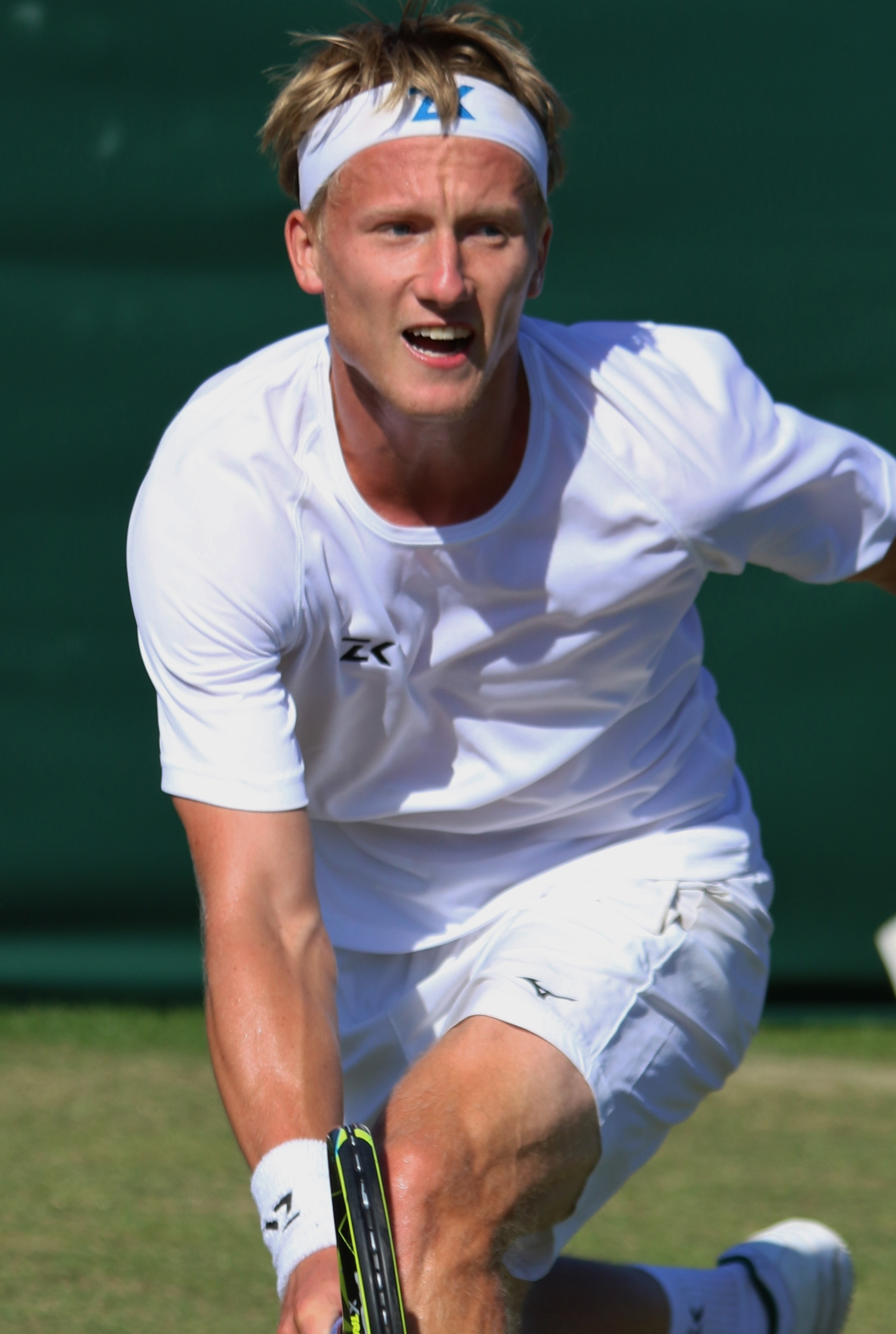 Kolar WMQ18 (46)